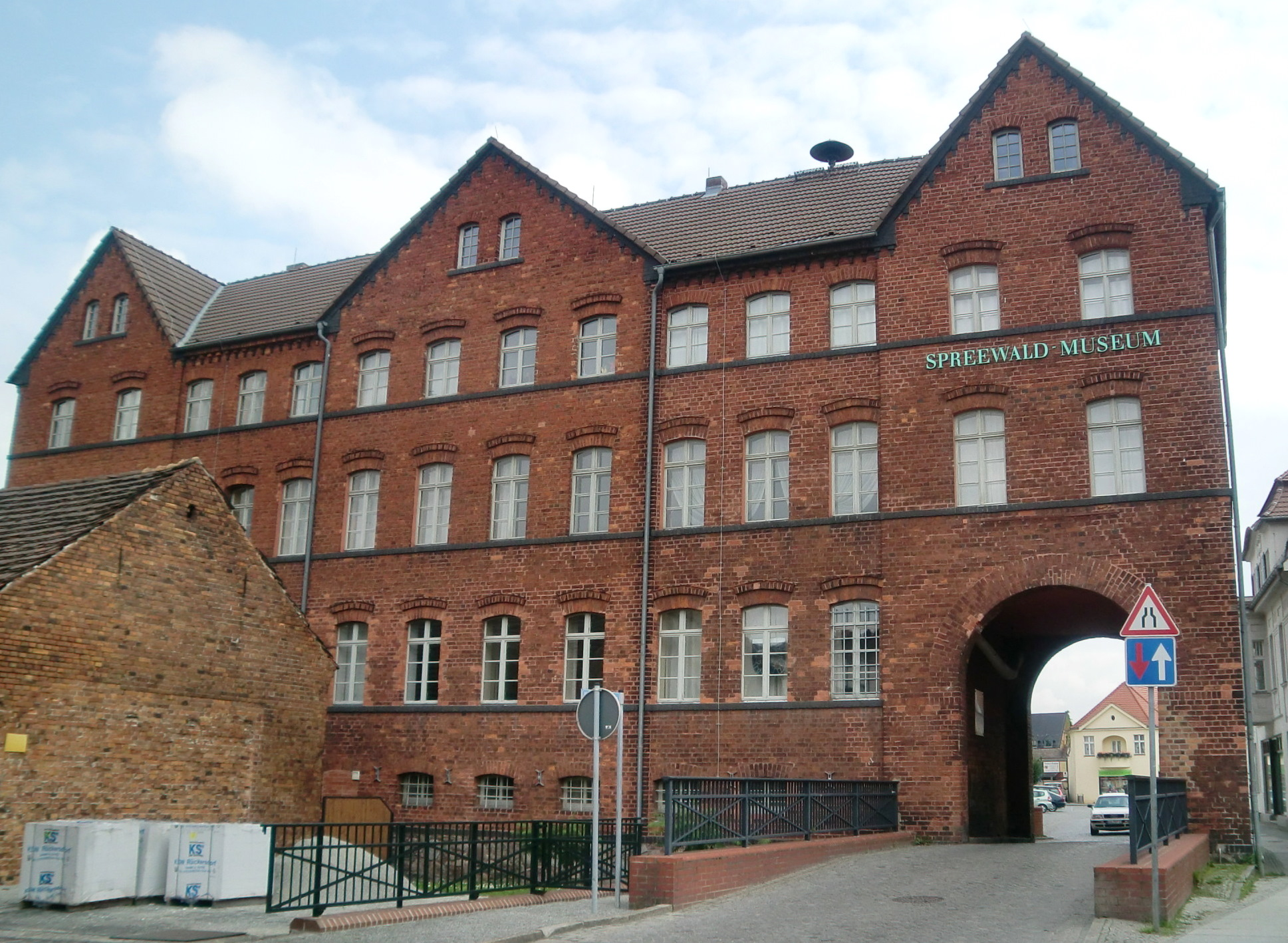 Spreewaldmuseum in Lübbenau, Torbogenhaus, Westseite